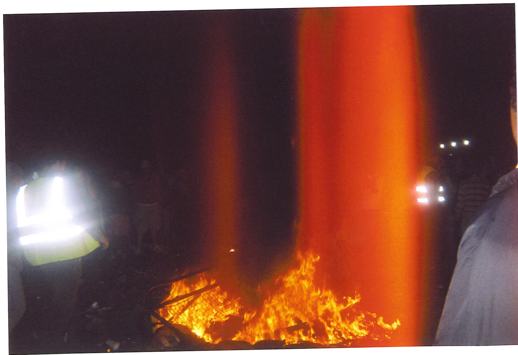 my own